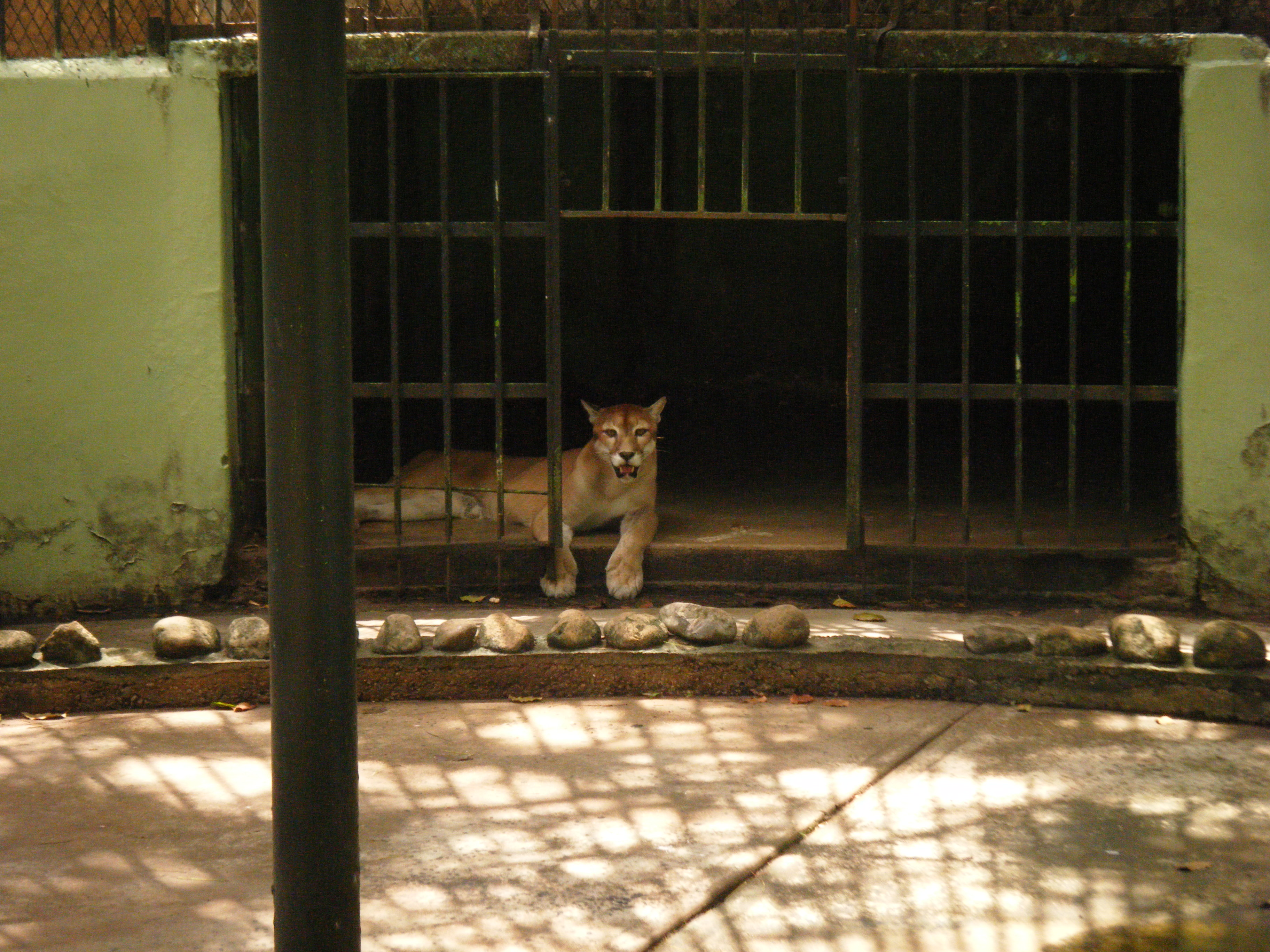 Puma en Parque La Guaricha, Maturin